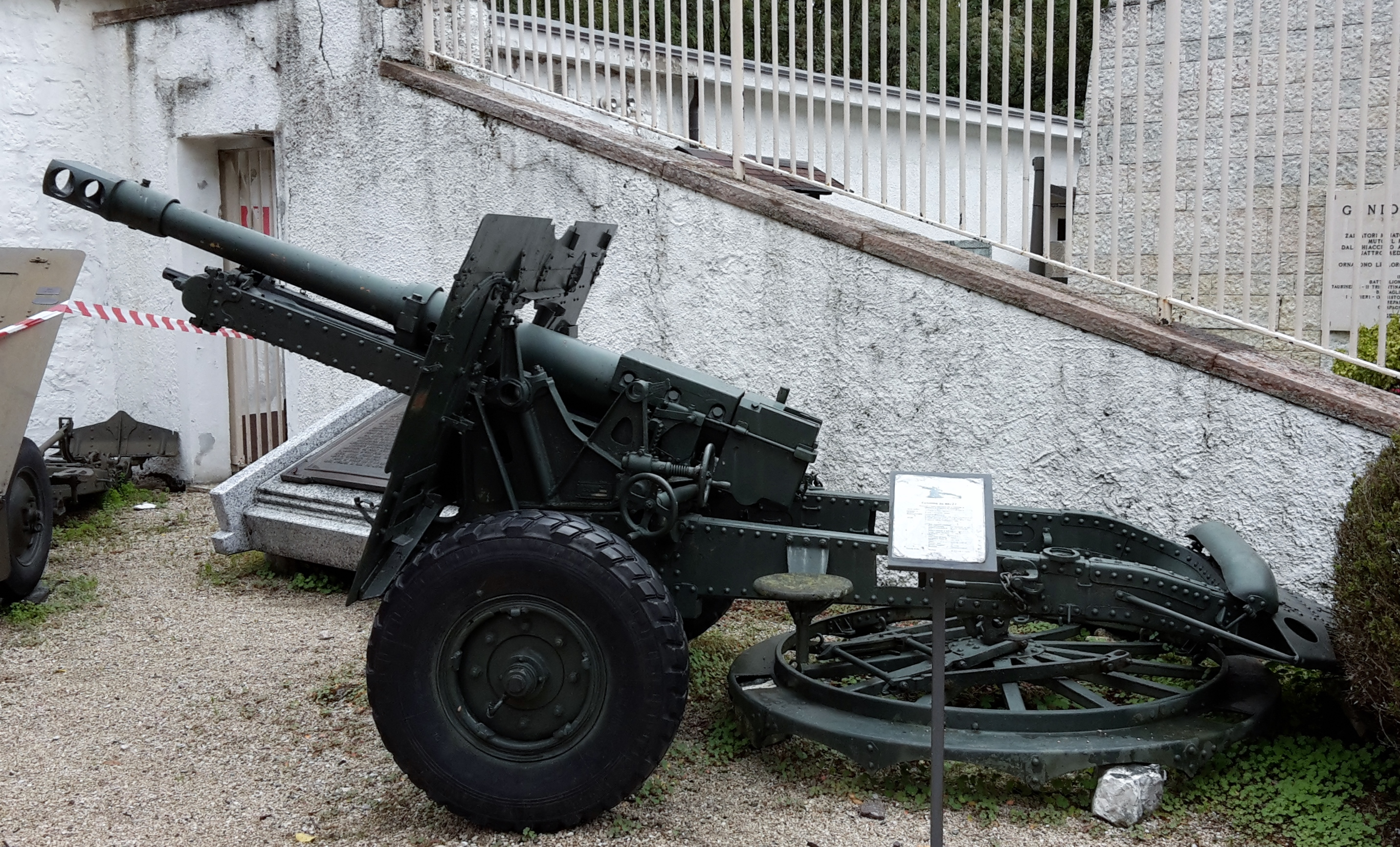 Obice da 88/27 presso il museo degli alpini, Trento